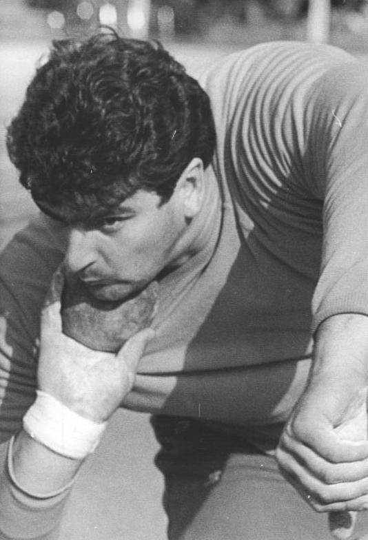 Udo Beyer ADN-ZB Kaufhold 16.07.1980 Cottbus: 31. DDR-Meisterschaftender Leichtathletik-Eine beachtliche Weite im Kugelstoßen erzielte Udo Beyer mit 21,54 m. Er wurde damit DDR-Meister im Kugelstoßen.